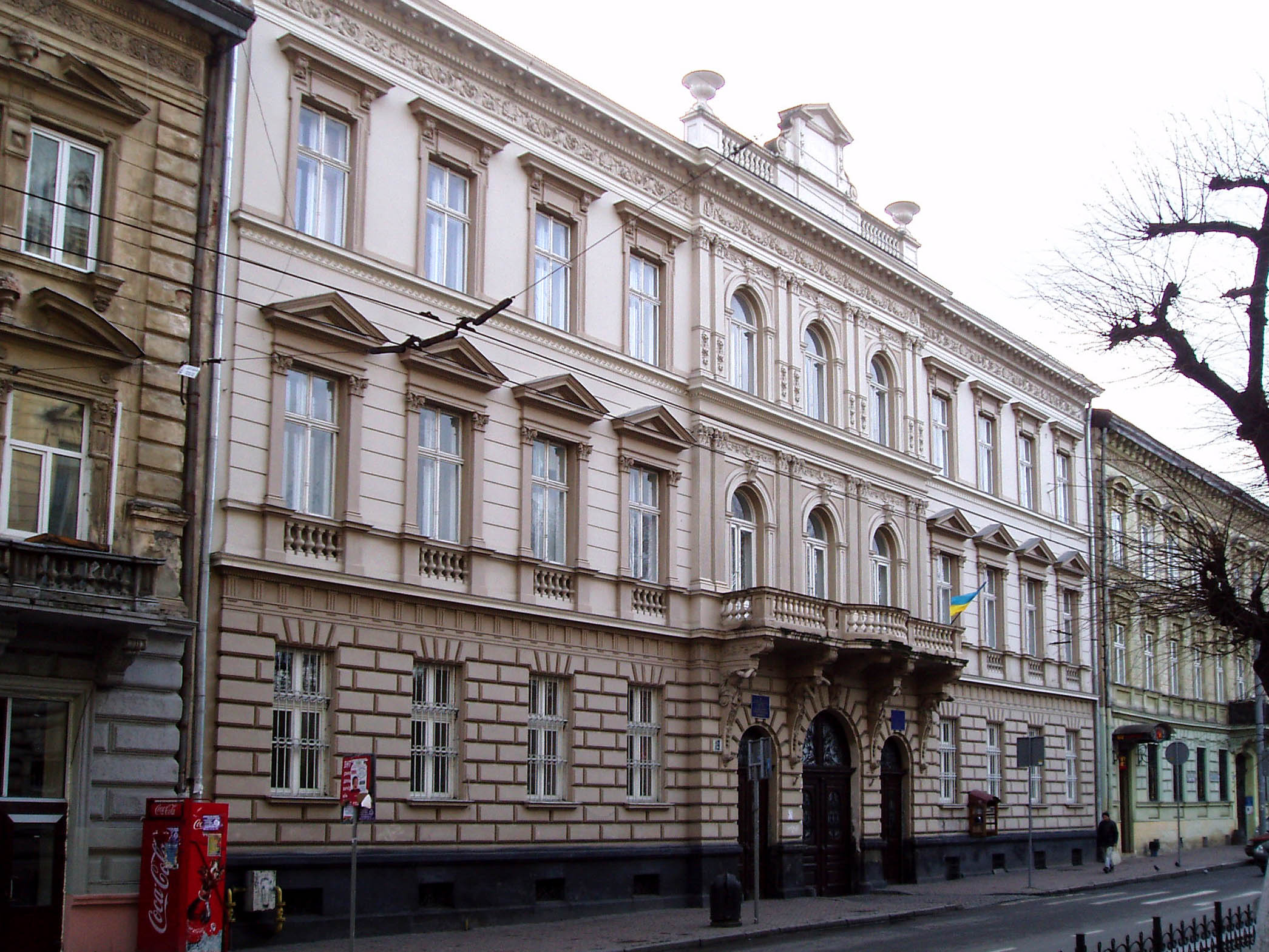 Будинок, зведений наприкінці 19 століття на вулиці Січових Стрільців, 19 у Львові.